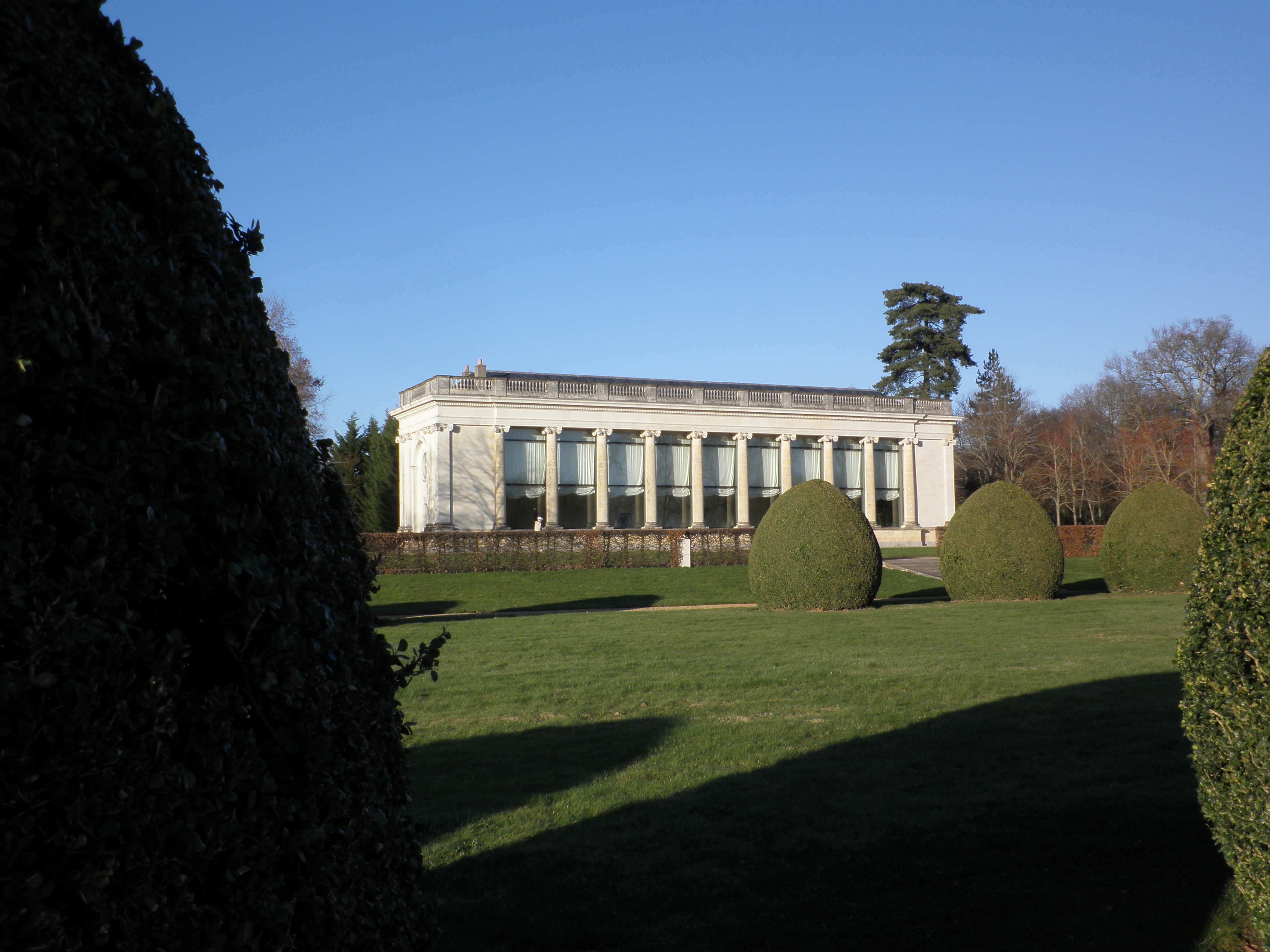 l'orangerie du château de pignerolles à Saint Barthélémy d'Anjou (49)